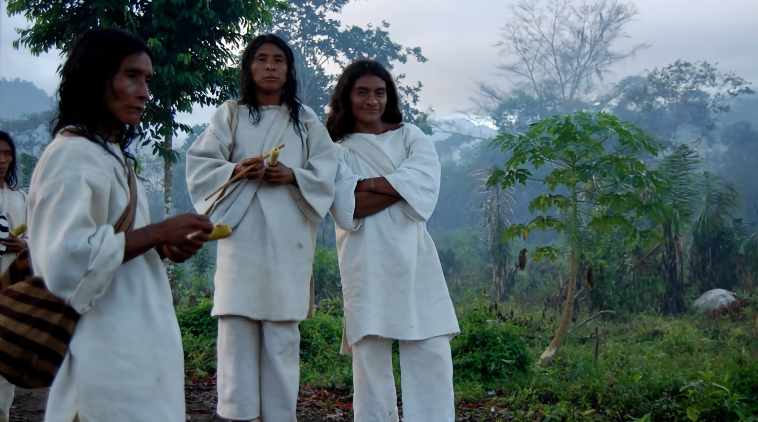 Kogui